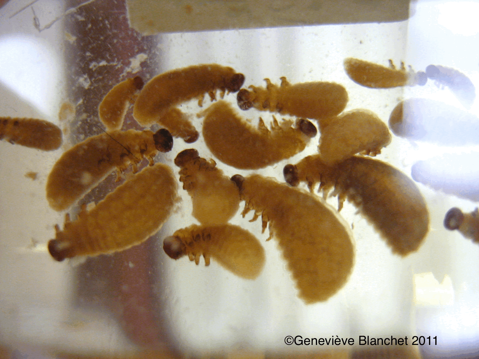 larves de scarabés